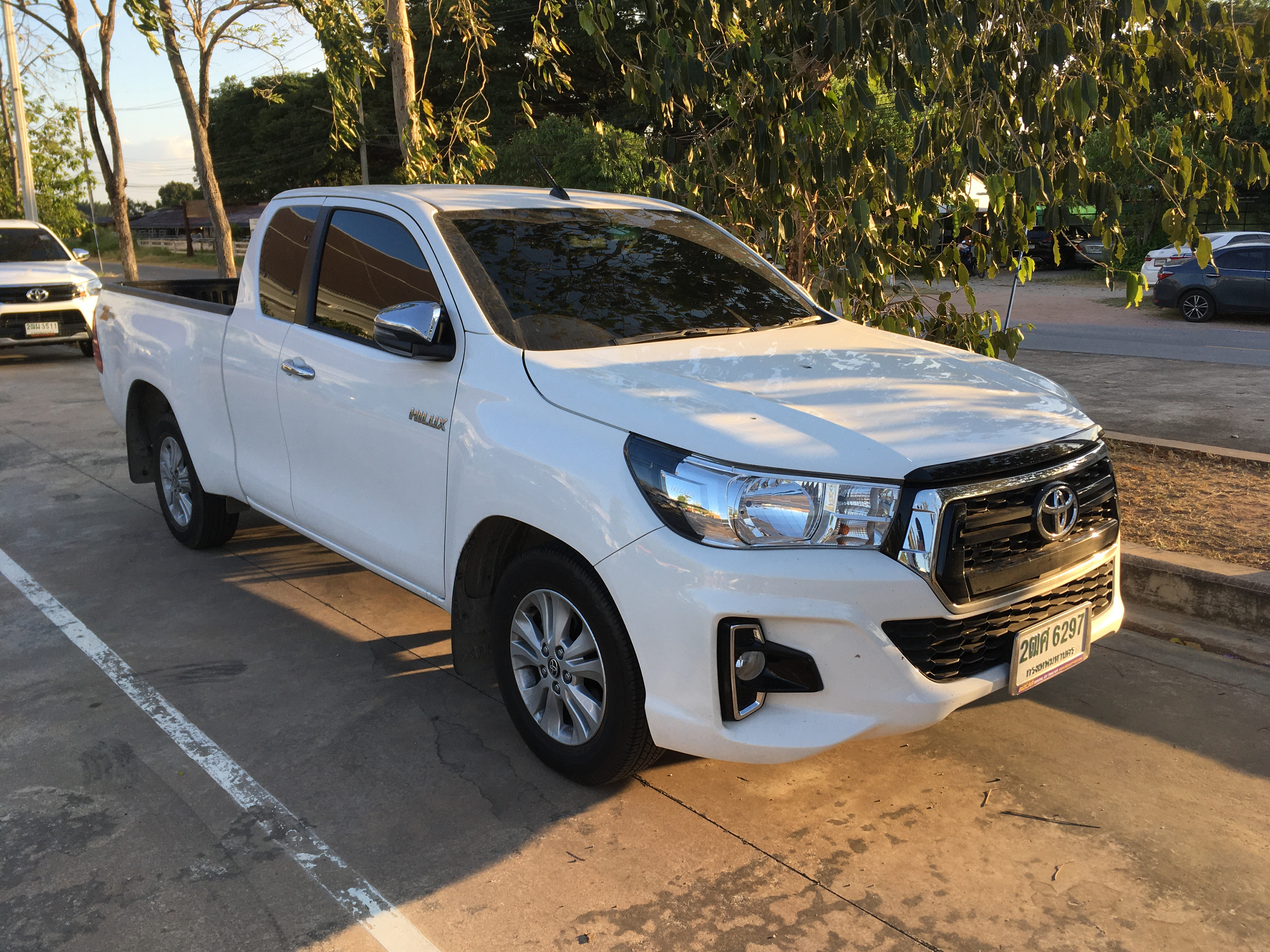 Toyota Hilux Revo Smart Cab Z-Edition 2.4E (GUN122R)